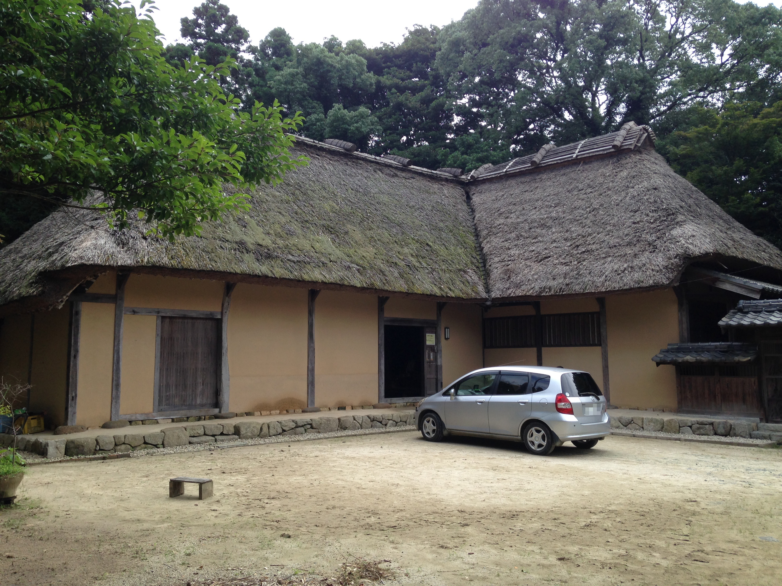 福岡県糟屋郡新宮町にある横大路家住宅(千年家)